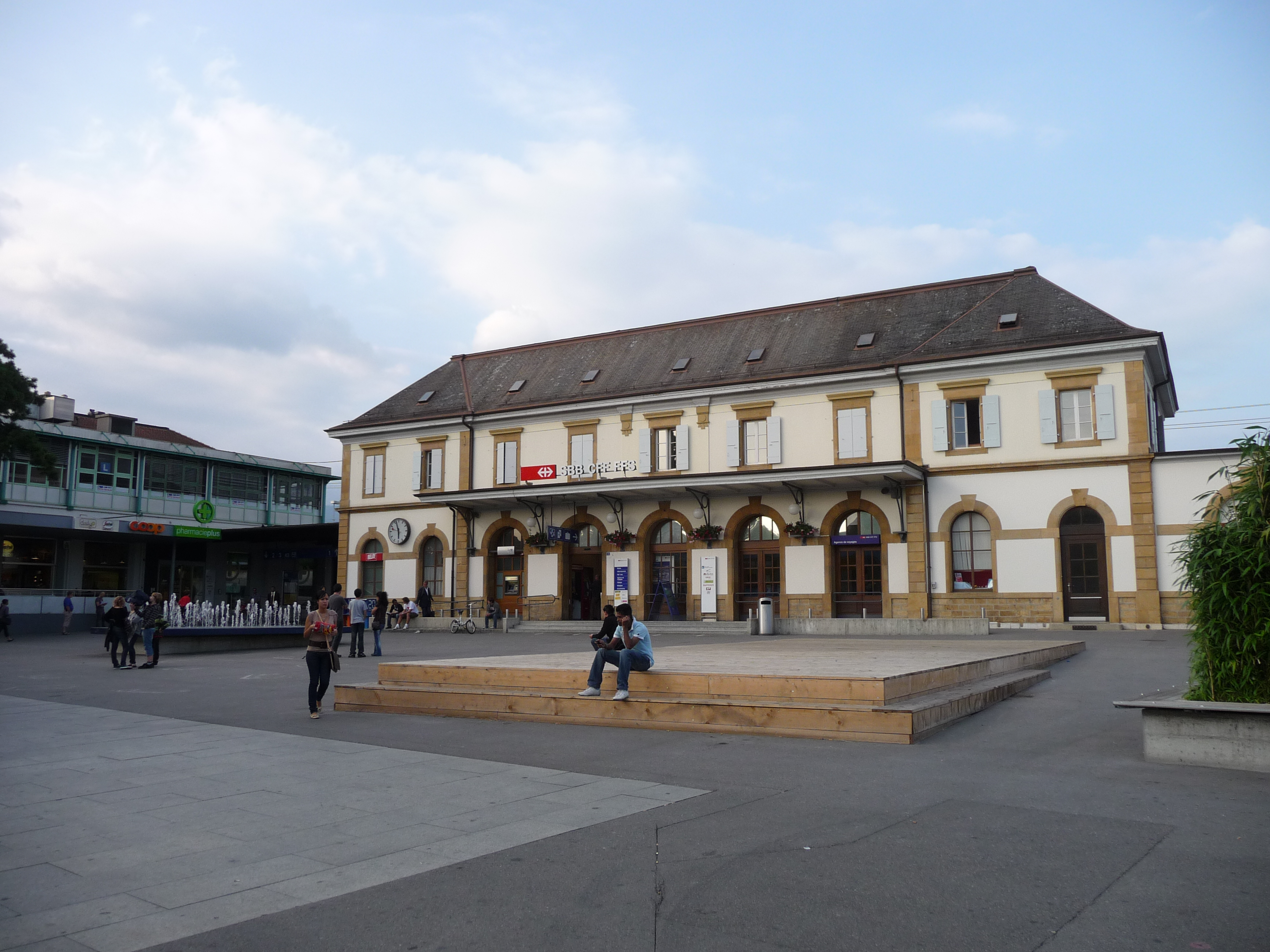 Gare de Yverdon-les-Bains.